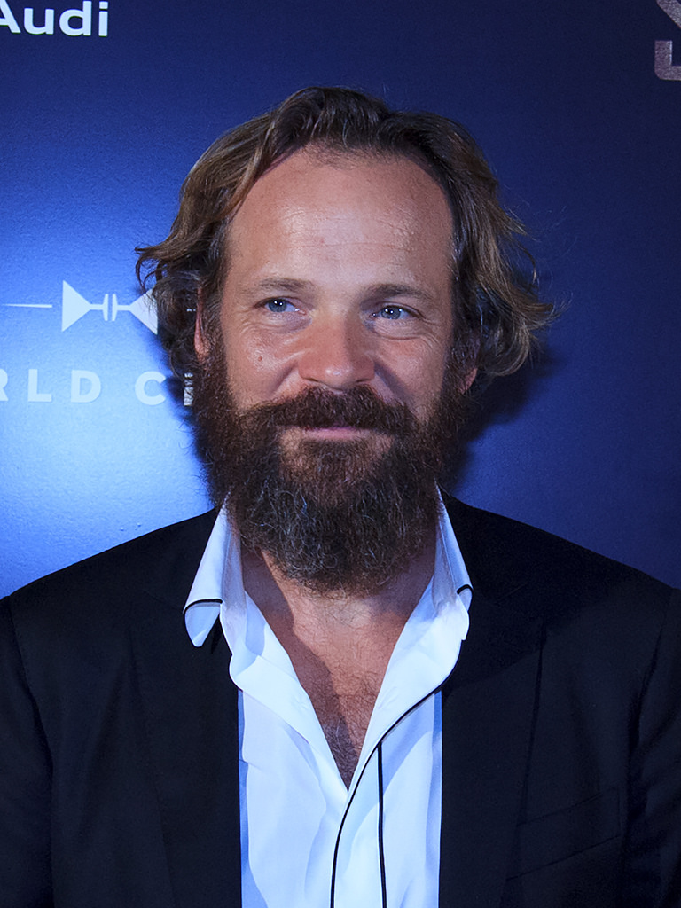 Toronto International Film Festival 2016